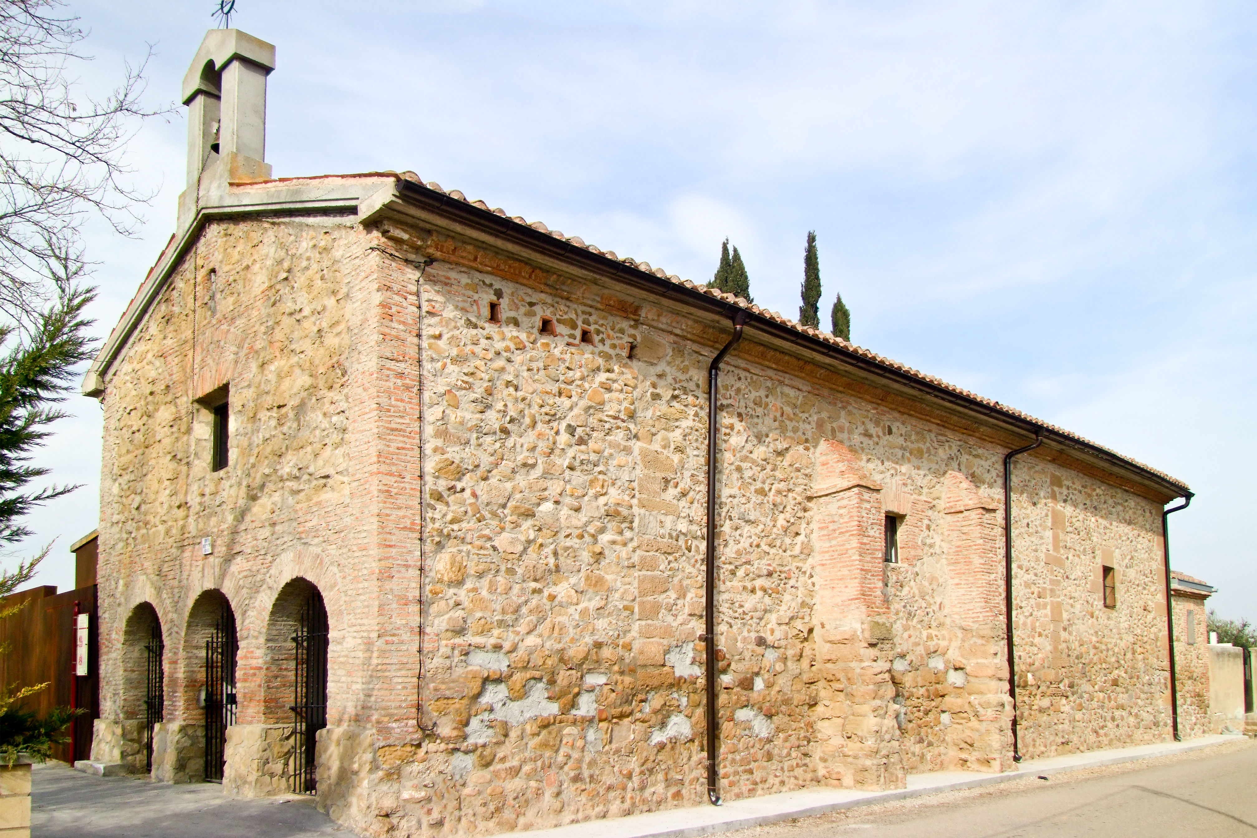 Ermita de la Virgen de Gracia en la localidad de Galilea, La Rioja - España